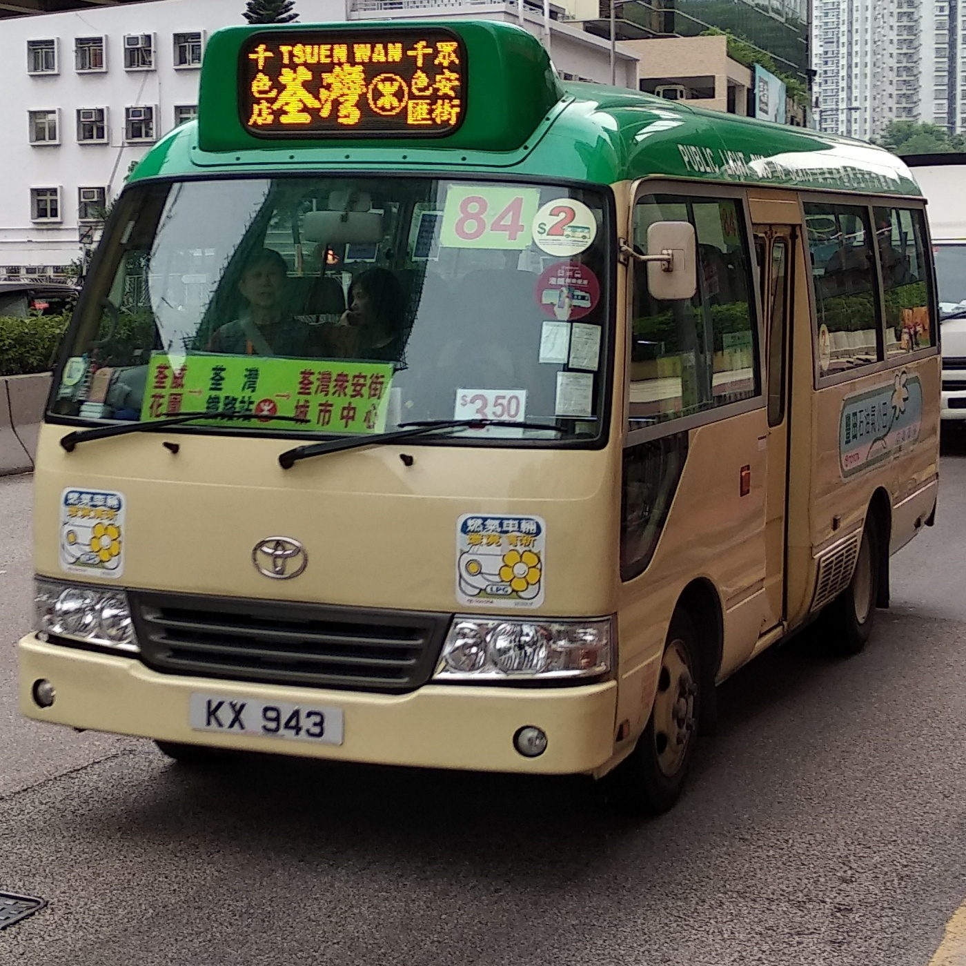 中文（香港）: 途經愉景新城外的一段青山公路－荃灣段的新界區專線小巴84線。